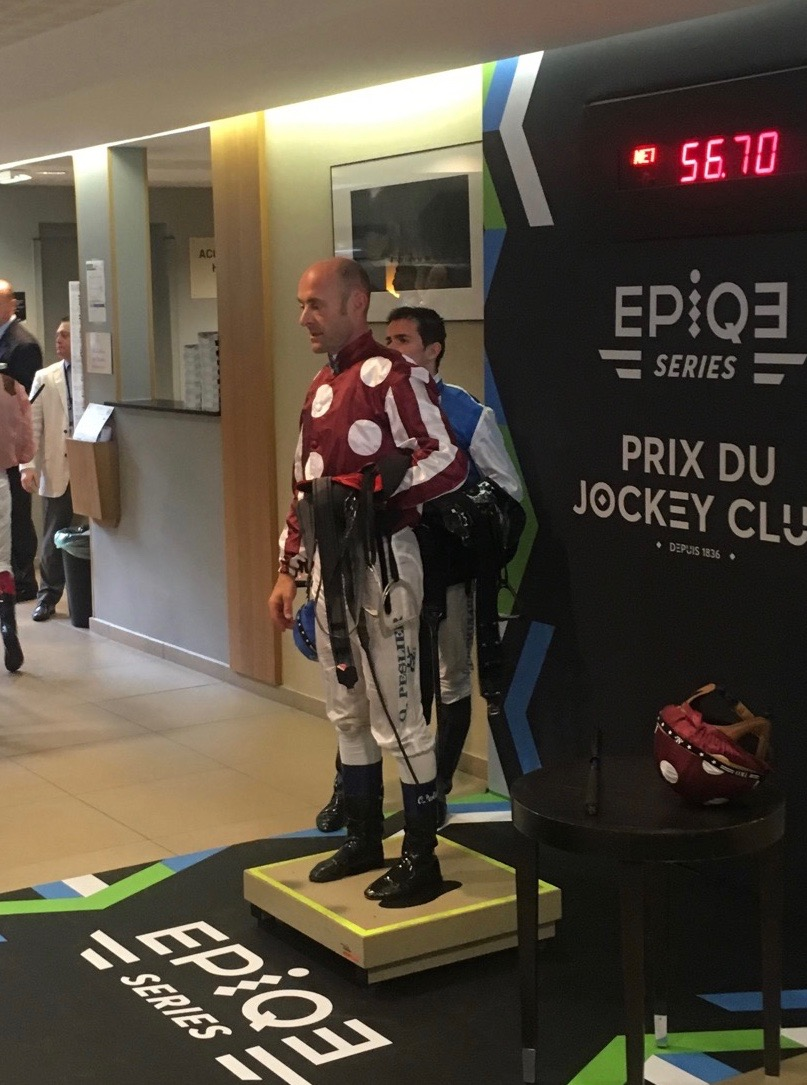 Olivier Peslier au pesage de l'hippodrome de Chantilly. Pesage après le prix de Sandringham, le jour du prix du Jockey Club 2016.